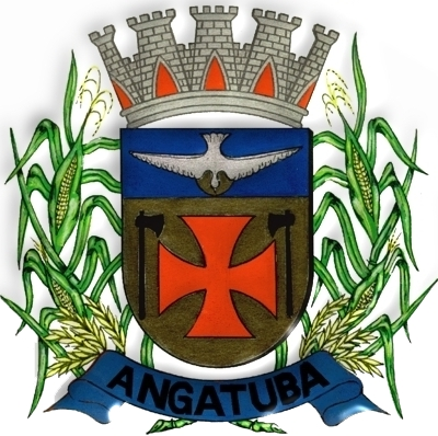 Brasão Oficial da Cidade de Angatuba. Fornecido pela prefeitura do município de Angatuba pelo funcionário Sr. João ("João da junta") .